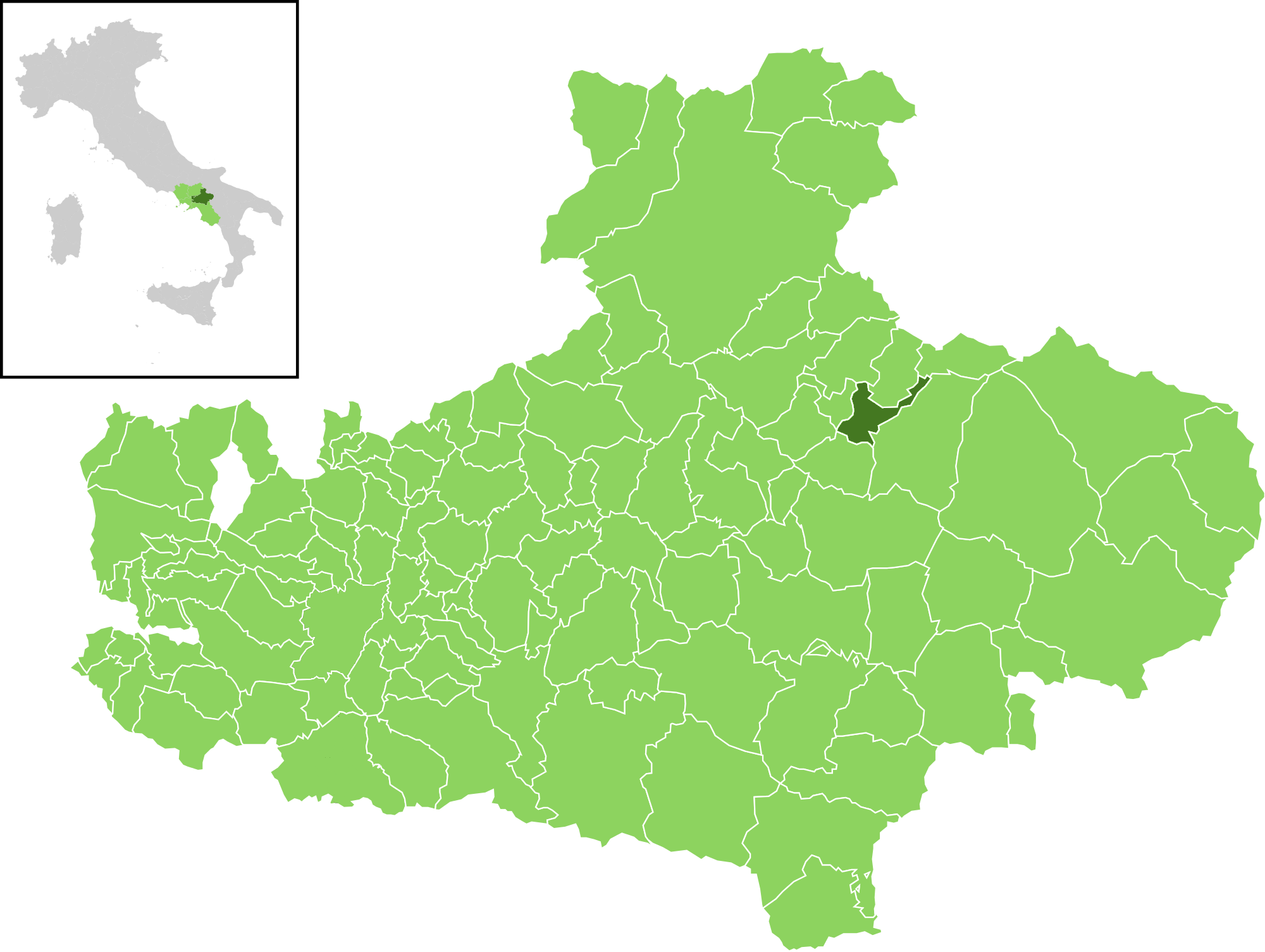 Posizione del comune all'interno della provincia di Avellino